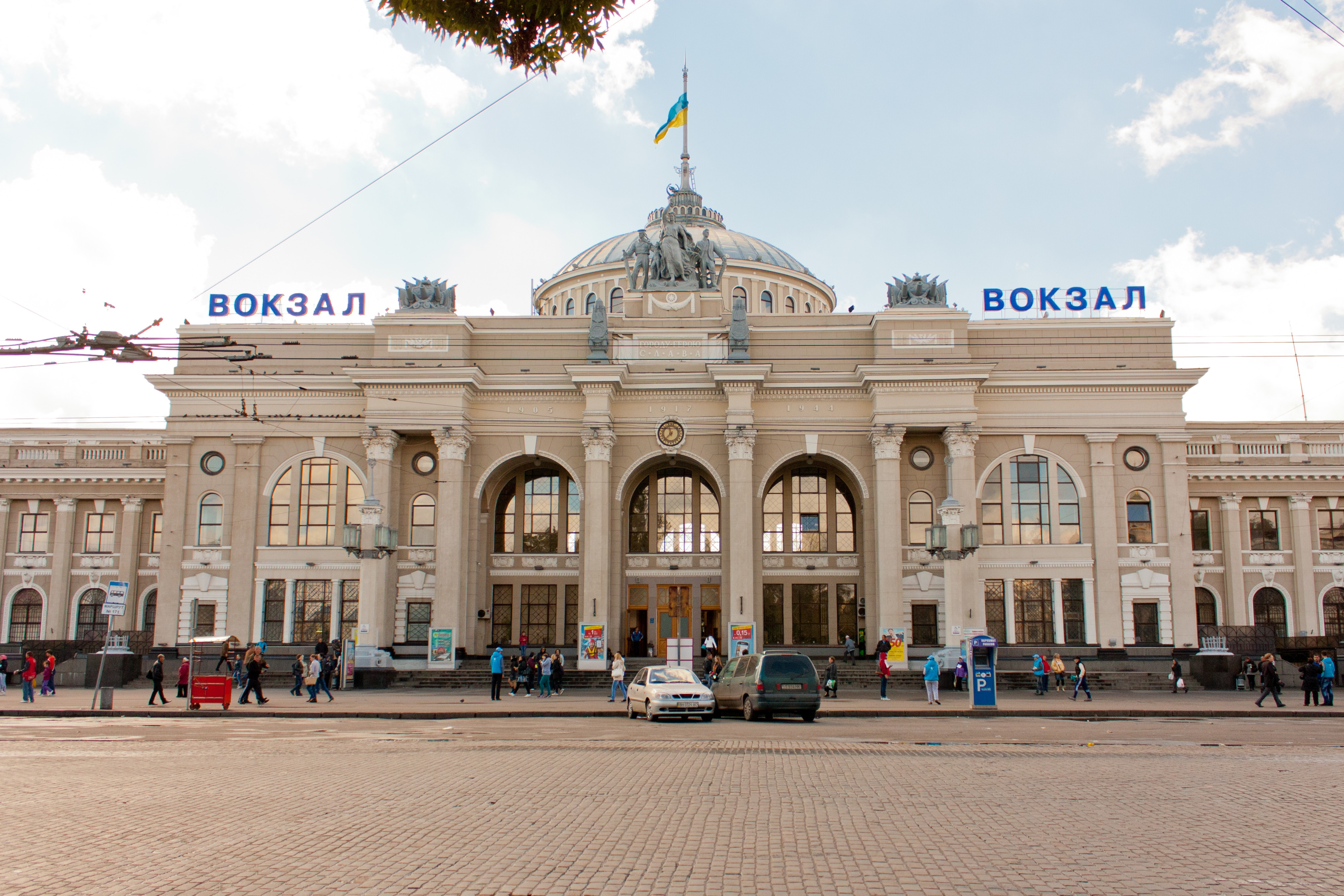 Будівля залізничного вокзалу, Одеса, Привокзальна пл.